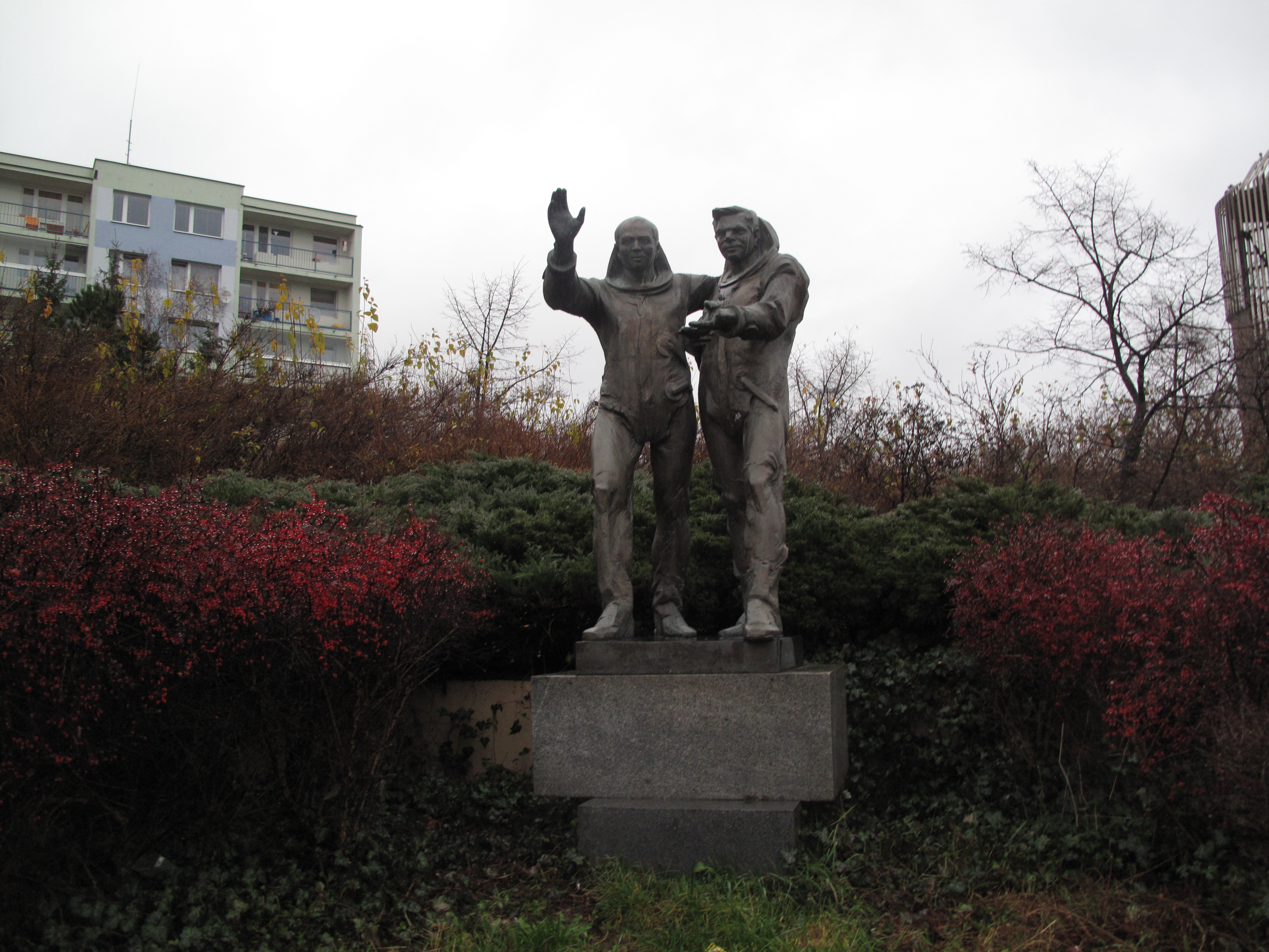 Kosmonauti v Hájích, socha od Jana Bartoše